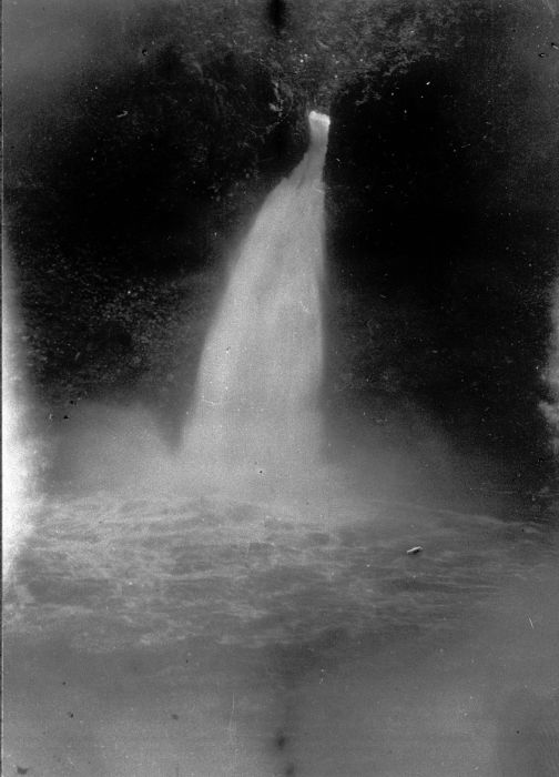 Foto. De Dagowaterval.